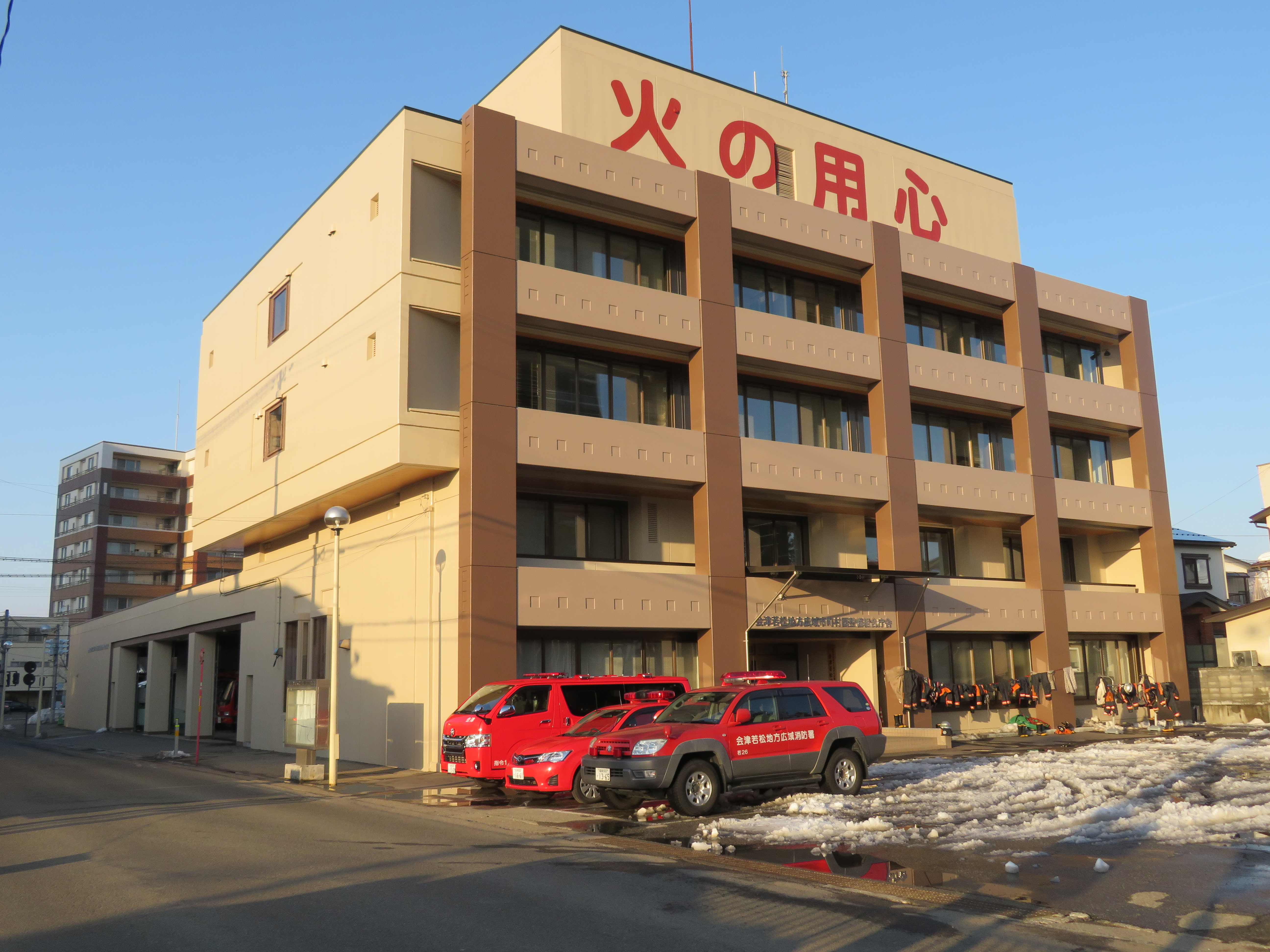 会津若松地方広域市町村圏整備組合消防本部会津若松消防署庁舎